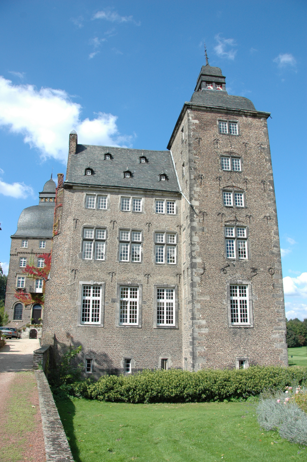 Schloss Myllendonk, Haupthaus, Ansicht von Westen